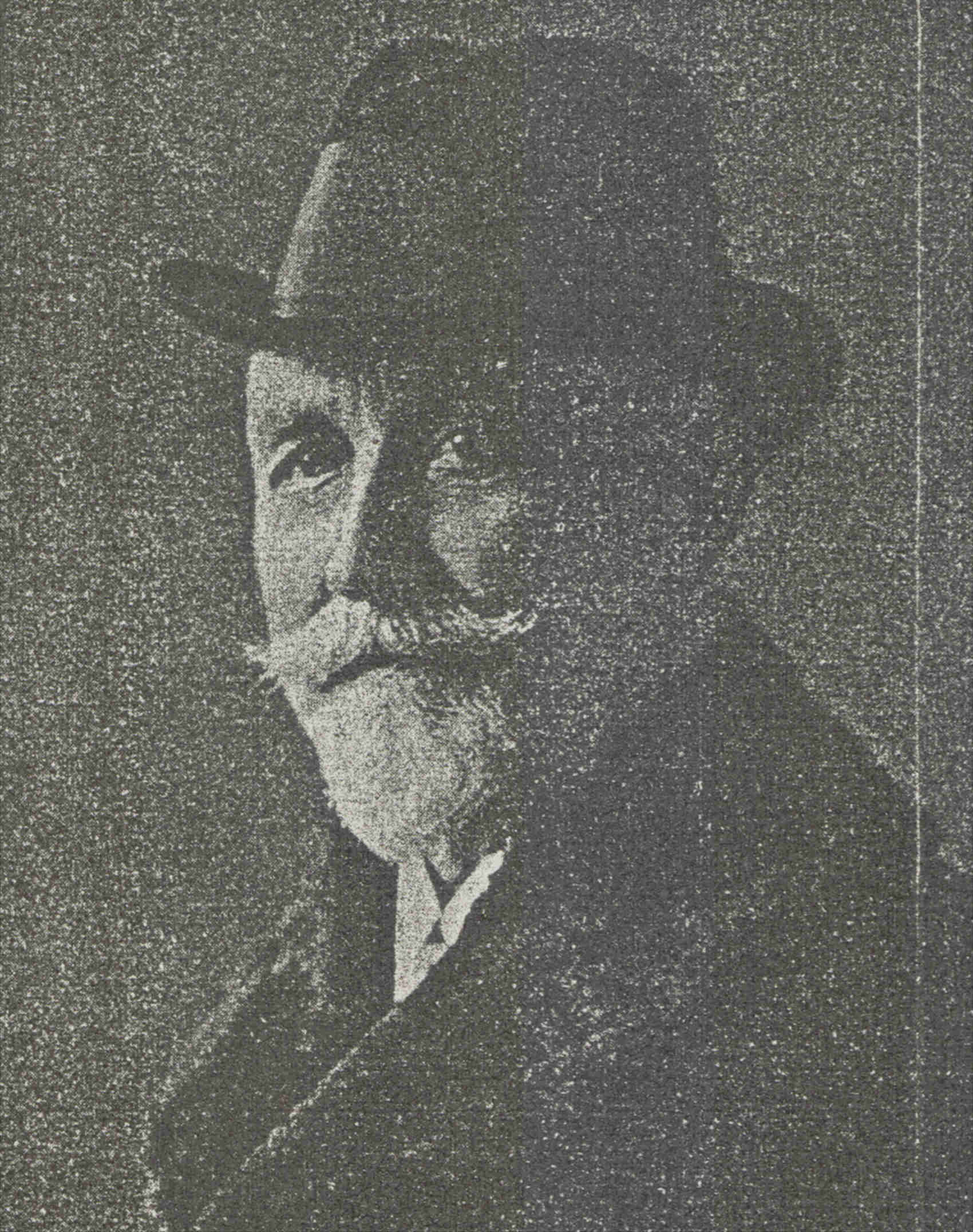 ak.mal.Václav Leo Anderle